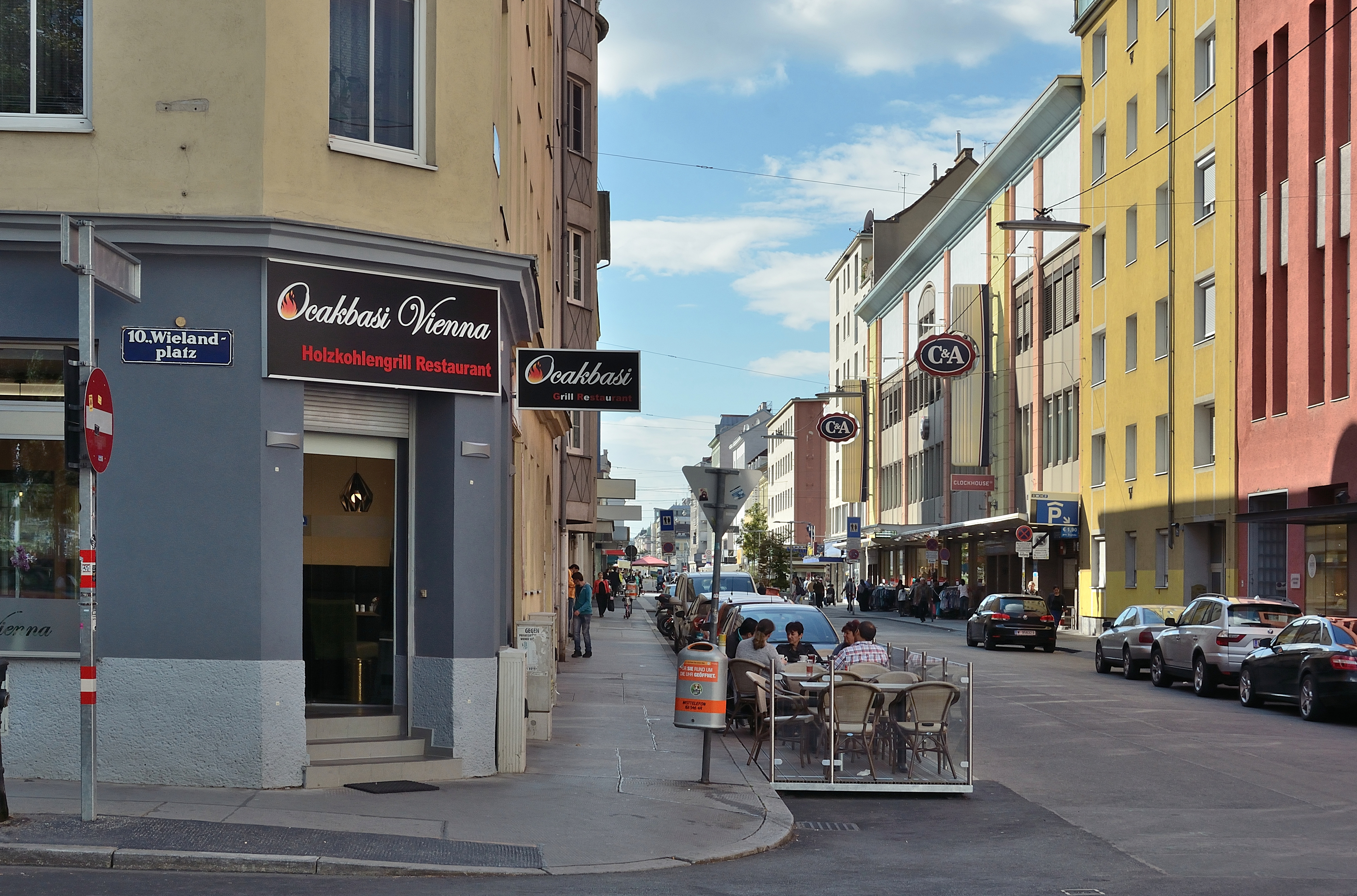 Das türkische Restaurant Ocakbasi Vienna am Wielandplatz / Ecke Erlachgasse in Wien-Favoriten.